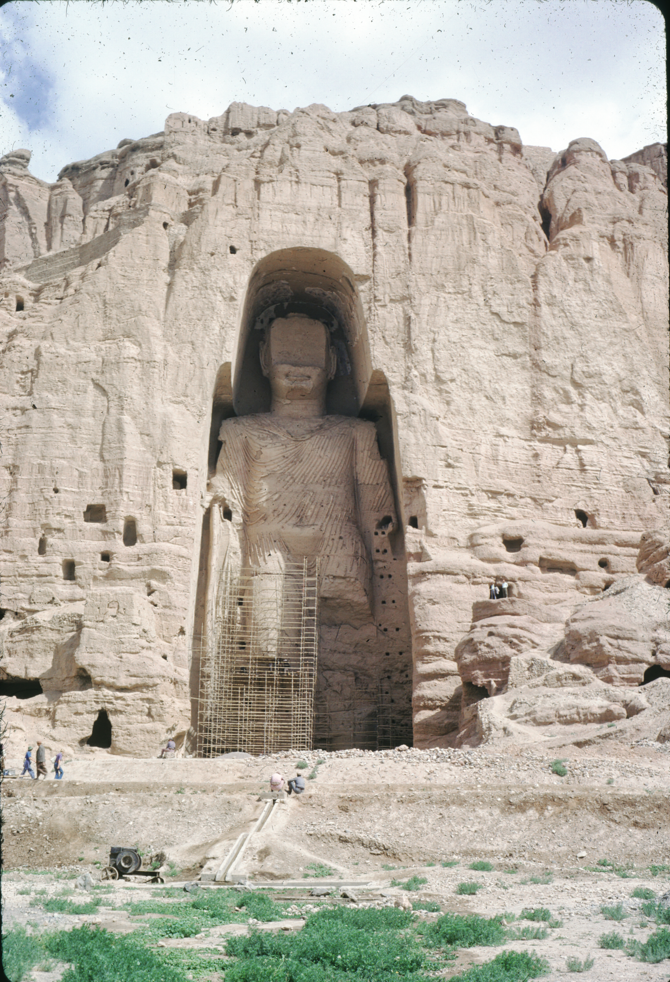 L'Afghanistan photographiée par Françoise Foliot.